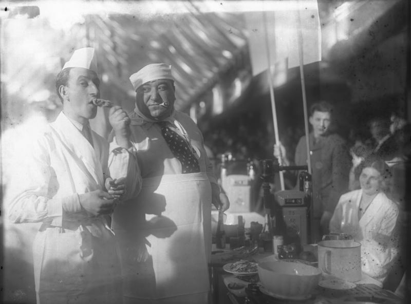 Prominente Bühnen- und Filmschauspieler als Kochkünstler auf der Kochkunstausstellung am Kaiserdamm! Der bekannte Bühnenkünstler Kurt Gerron lässt Siegfried Arno von seinem selbstzubereiteten Essen kosten.